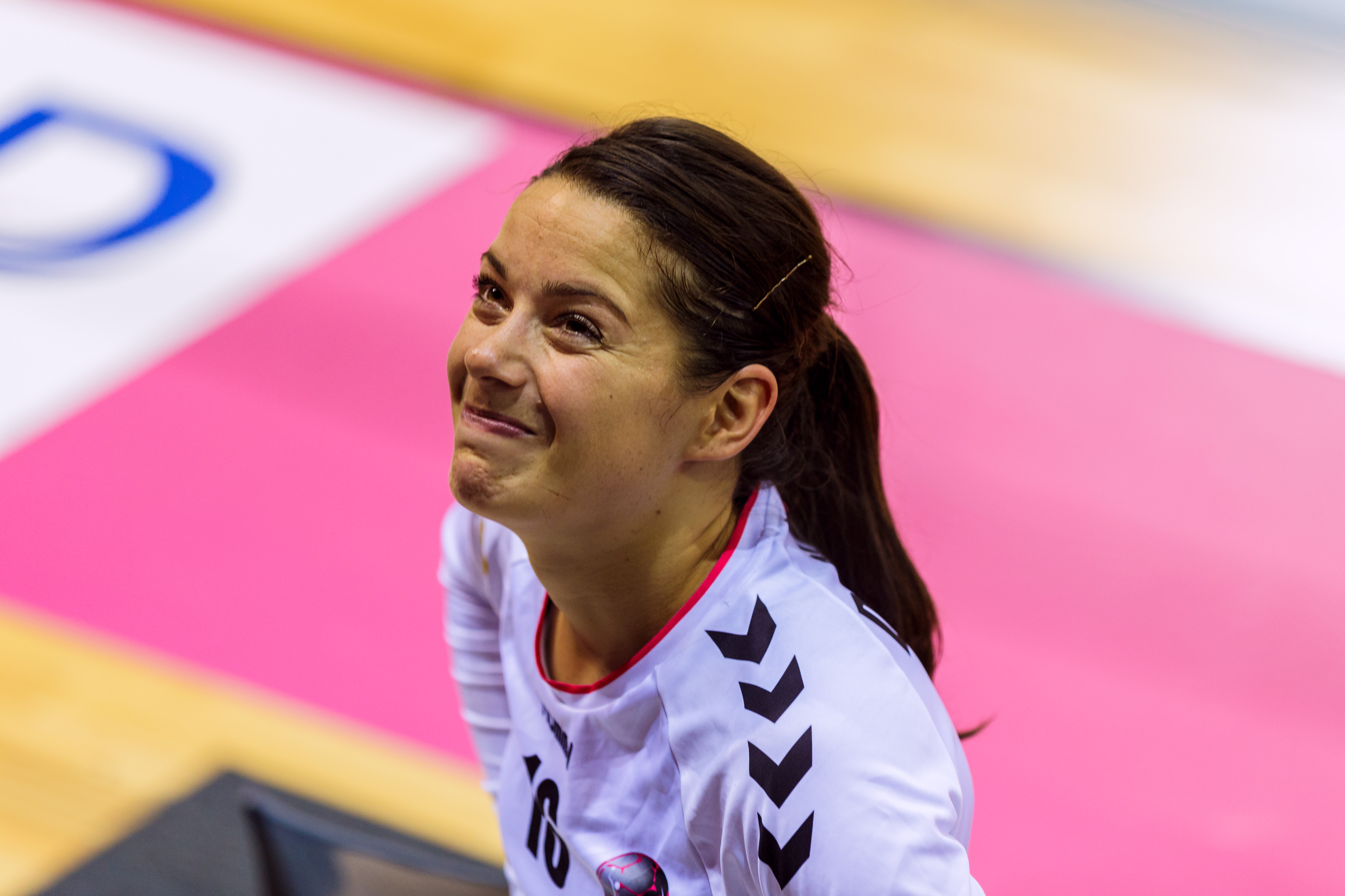 Match de handball du BREST Bretagne Handball à domicile face à Besançon (Entente Sportive Bisontine Féminin) le 16 novembre 2016. La Brest Arena a vu son club l'emporter 24-21.